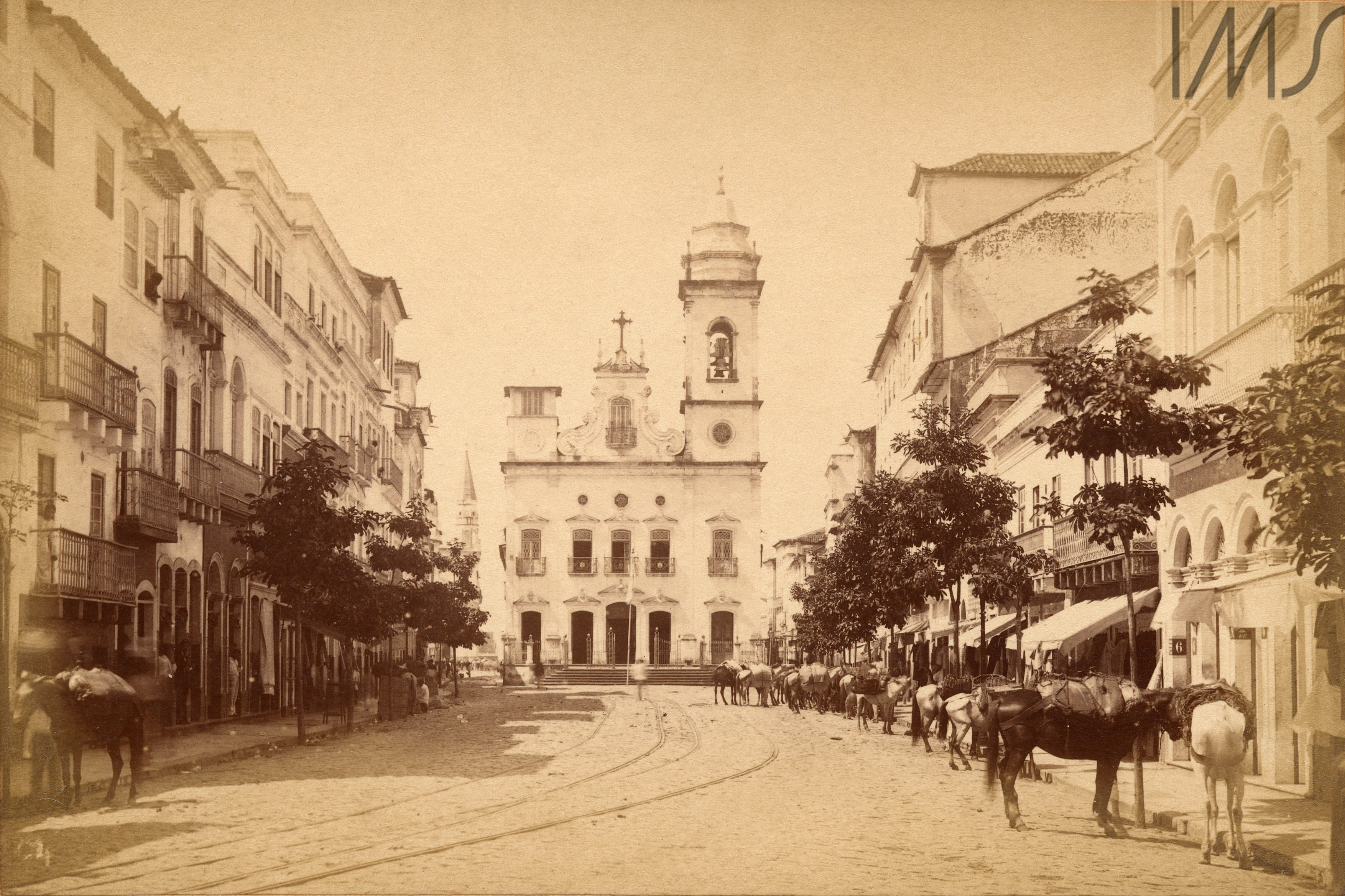 Igreja e Largo do Livramento - Recife, Pernambuco, Brasil Gaensly, Guilherme Data: 1880 circa Descrição: MONOCROMÁTICA / SEPIA i:9,9 cm x 15,4 cm sp:10,9 cm x 16,6 cm Albumina/ Prata Assuntos: GILBERTO FERREZ Animais Igreja do Livramento Transportes Arquitetura Horizontal Diurna Flora / Vegetação Externa Largo do Livramento - Recife Localidade: Recife Largo do Livramento, Santo Antônio PE Brasil Fonte: Gilberto Ferrez